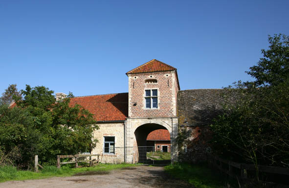 Haacht Kraneveld 1